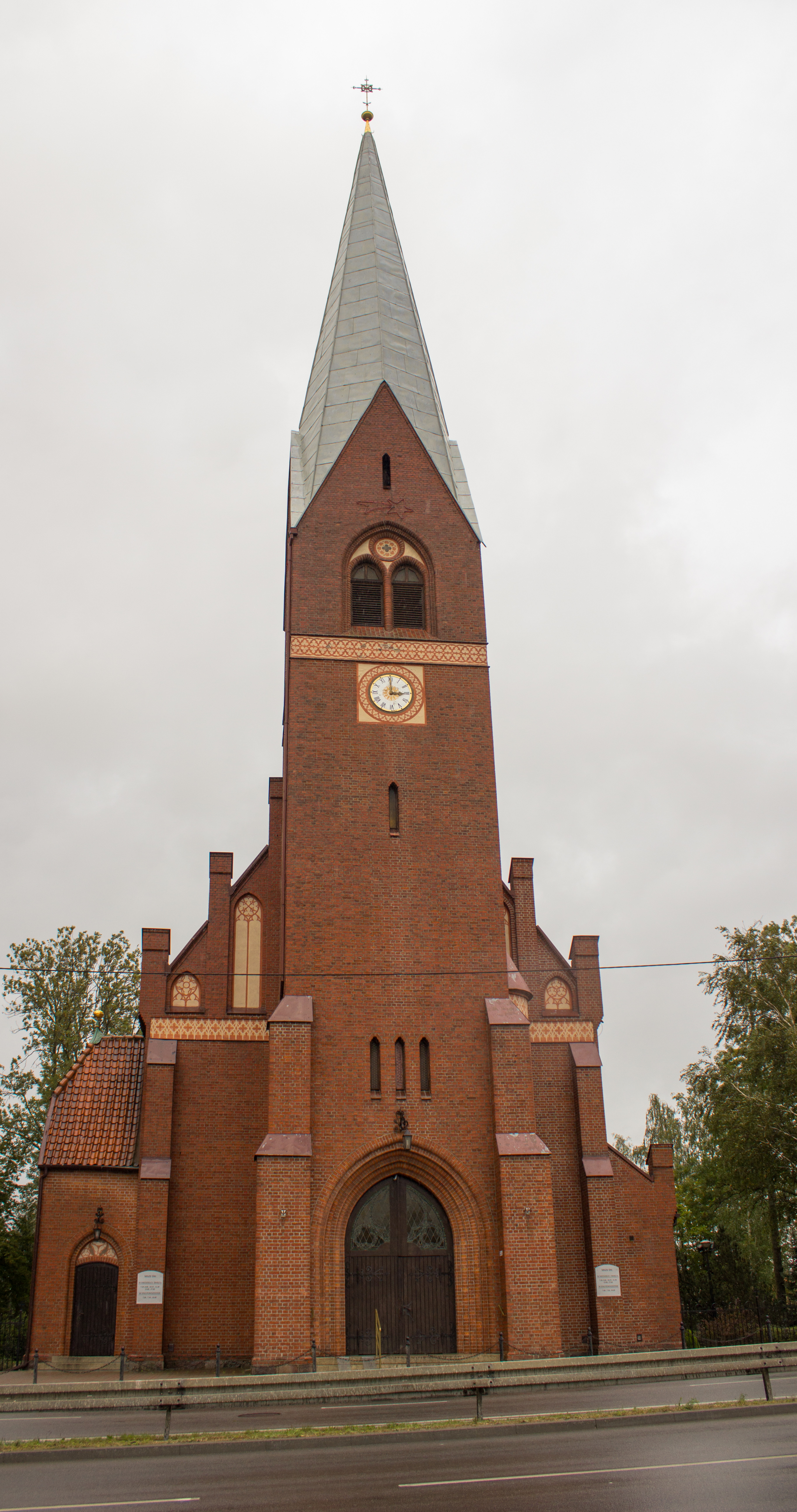 Kościół parafialny p.w. Wniebowzięcia NMP (dawniej p.w. Św.Katarzyny) Reda, ul. Gdańska 3, Reda